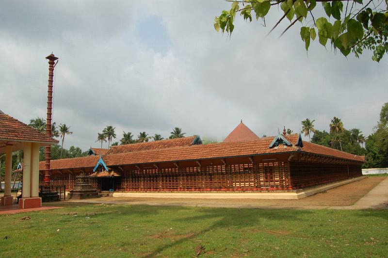 Thirumoozhikkulam Sree Lakshmanaperumal Temple